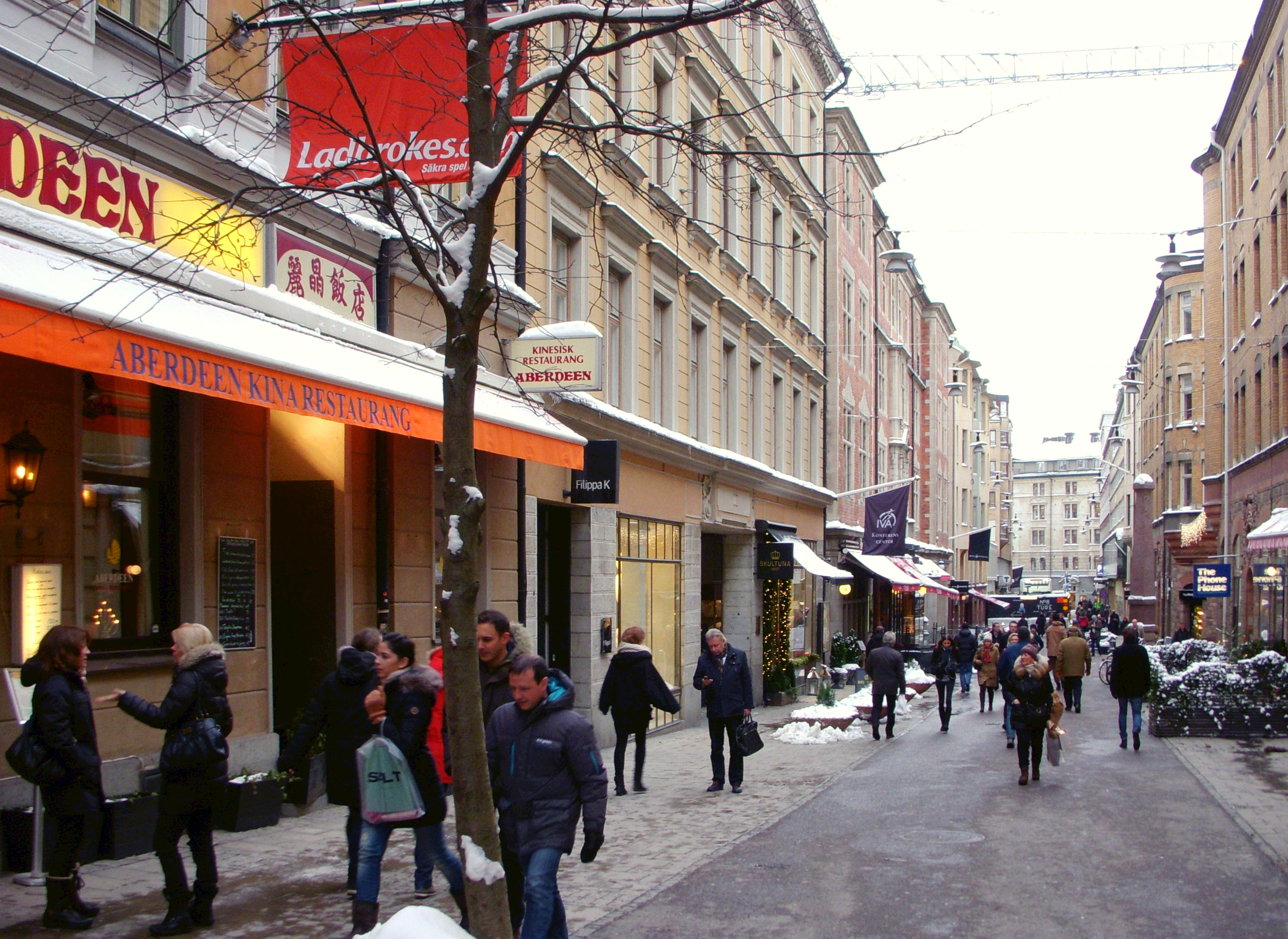 Grev Turegatan mot syd med nummer 18 mitt i bild (Riddaren 16, arkitekt Oskar Erikson, 1877)